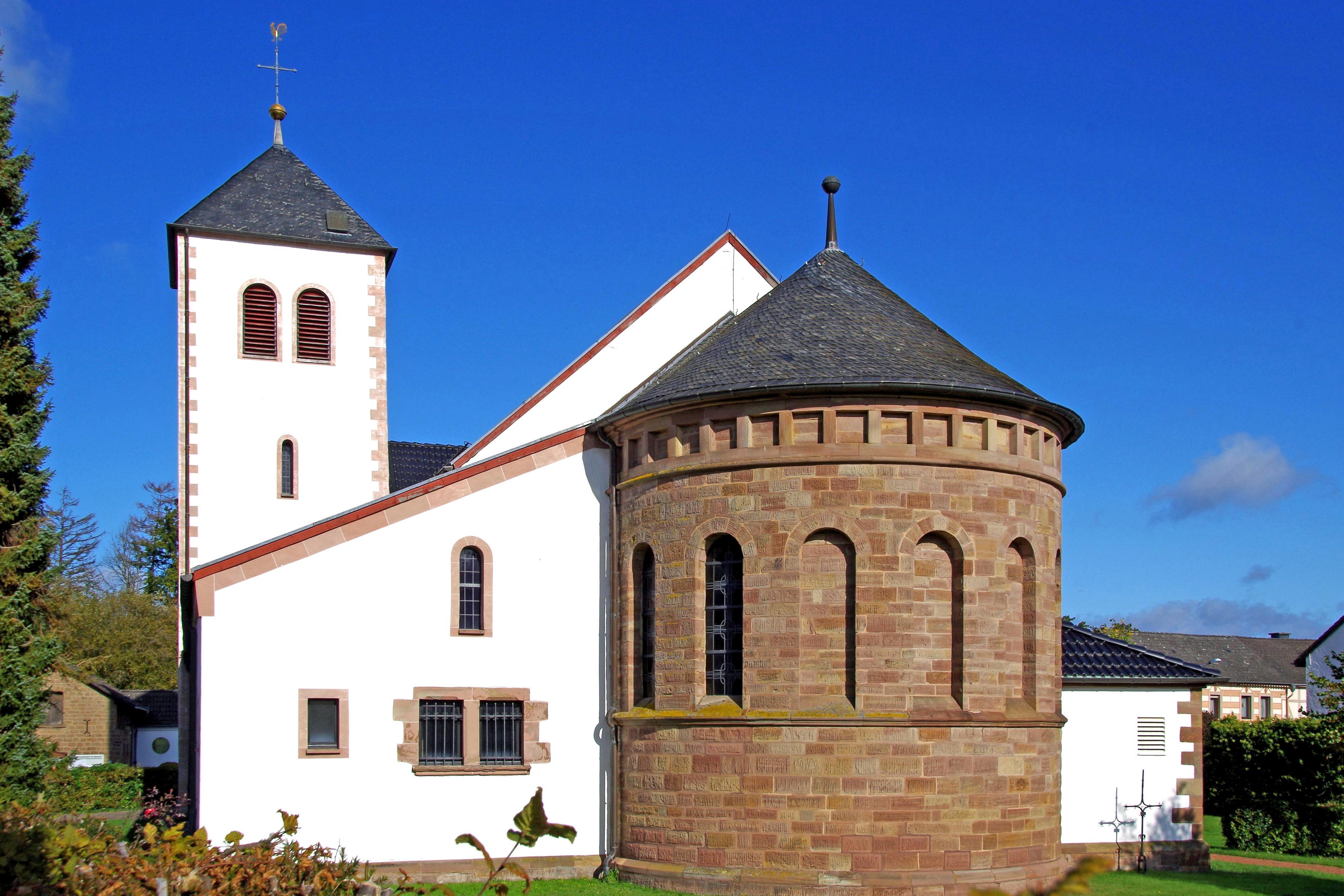 St. Martinus (Hergarten), Außenansicht von Osten